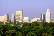 Skyline von Winston-Salem